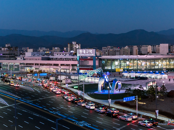 동대구역 광장